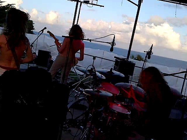 Burtul er "The Beach Girls and the C'heñlc'h Monster Festival"